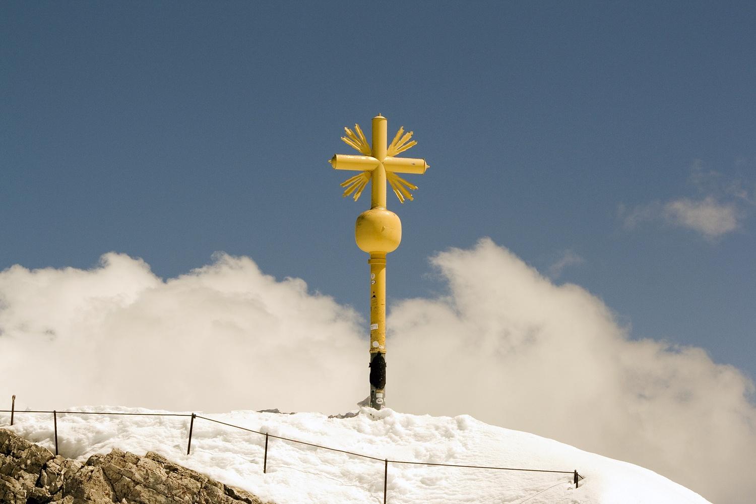 Garmisch-Partenkirchen, Bayern, Datum/Uhrzeit: 12.05.2008 12:36:44